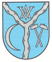 Wappen von Rathsweiler